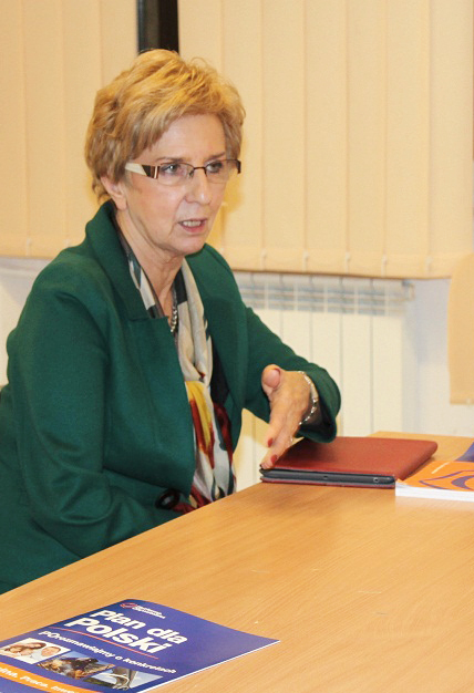 Spotkanie zorganizowane przez posłankę Ligię Krajewską - Warszawa Żoliborz, mazowieckie (12-11-05).